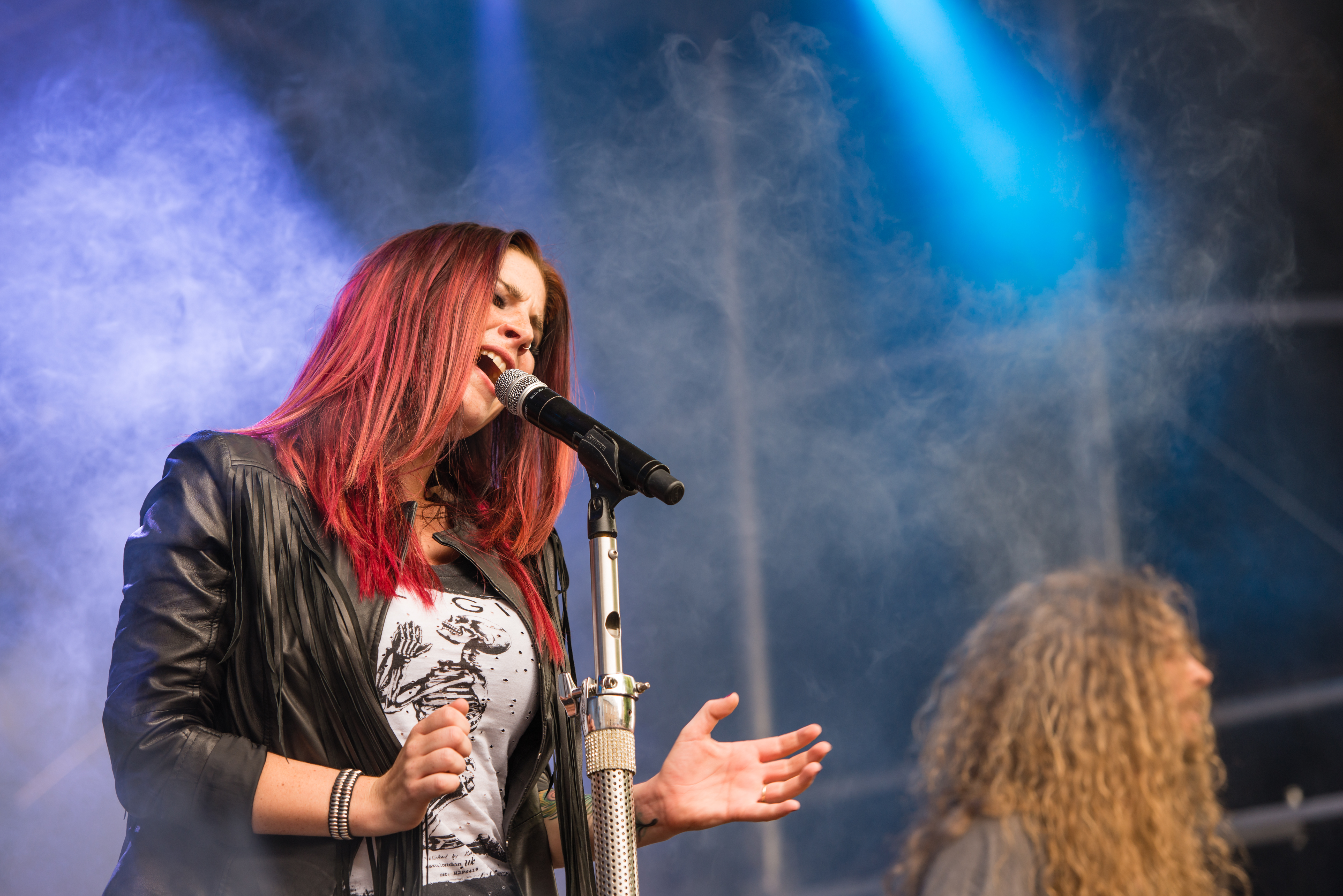 'Castle Rock 2014 - Mülheim an der Ruhr': 'Delain'